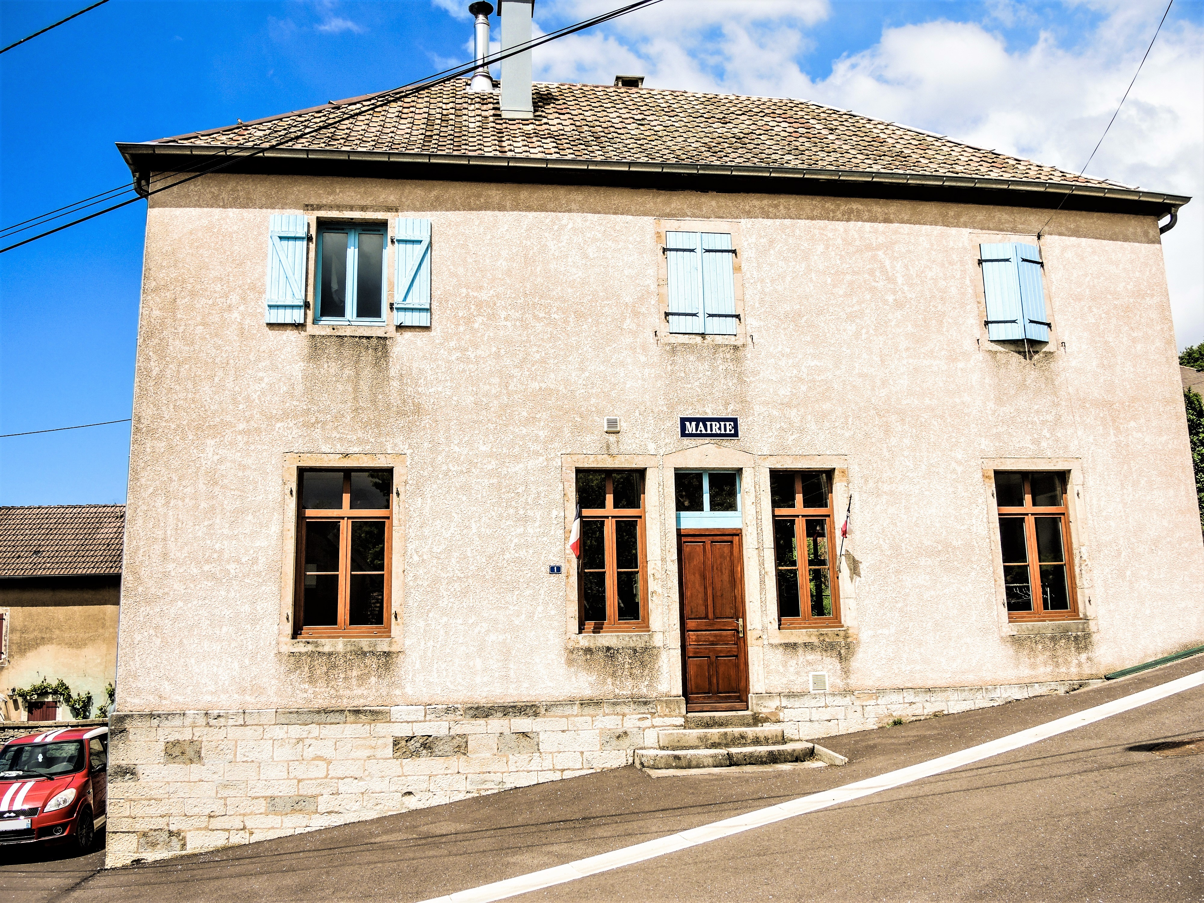 Mairie